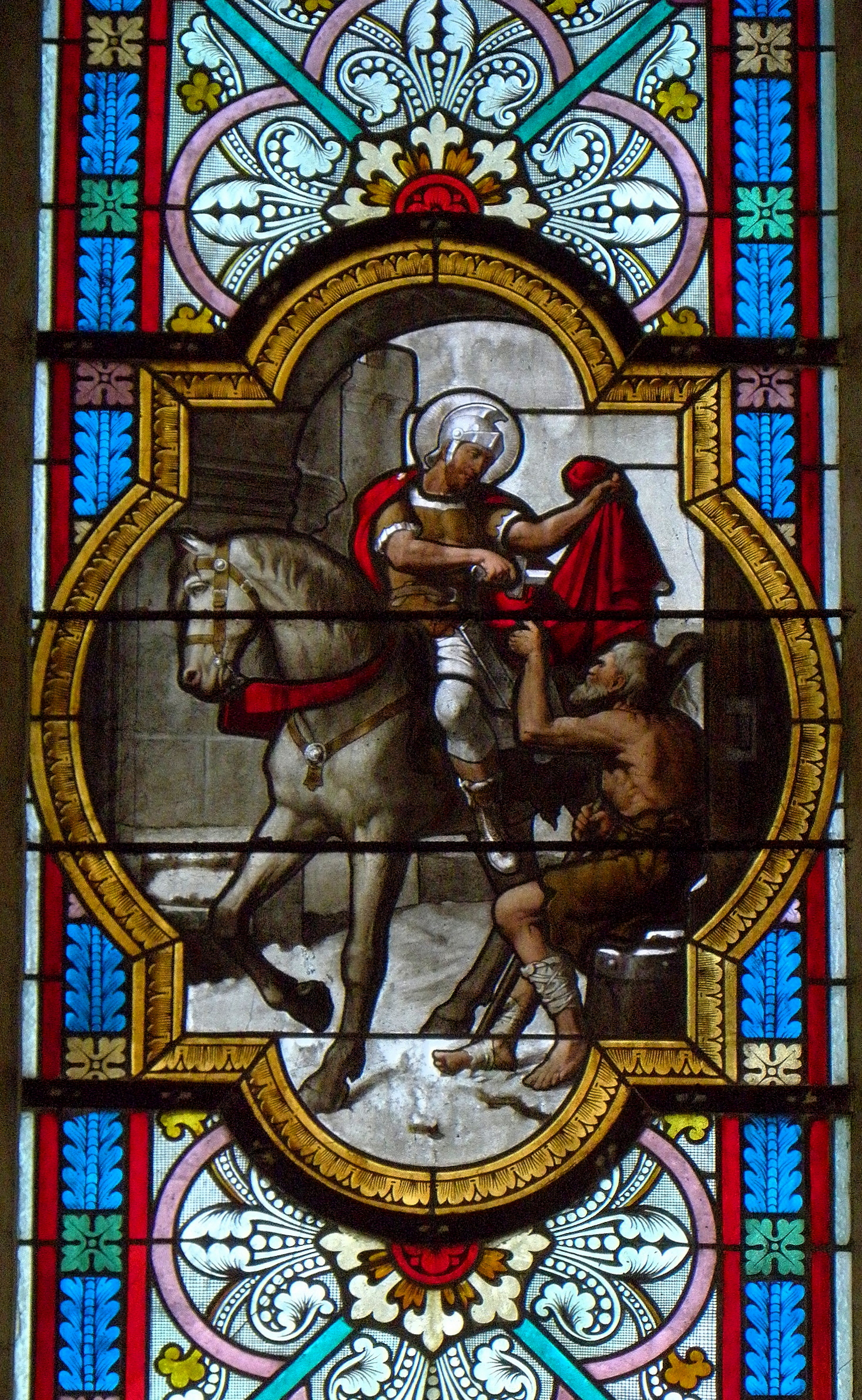 Charité de Saint-Martin. Vitrail de l'église Saint-Martin-de-Tde Roz-sur-Couesnon (35).